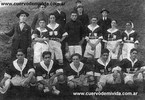 Formacion del Cñub Atlético Central Norte en 1921